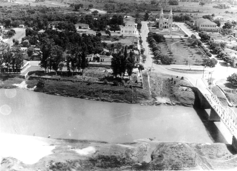 Igreja Matriz de Aquidauana vista aérea